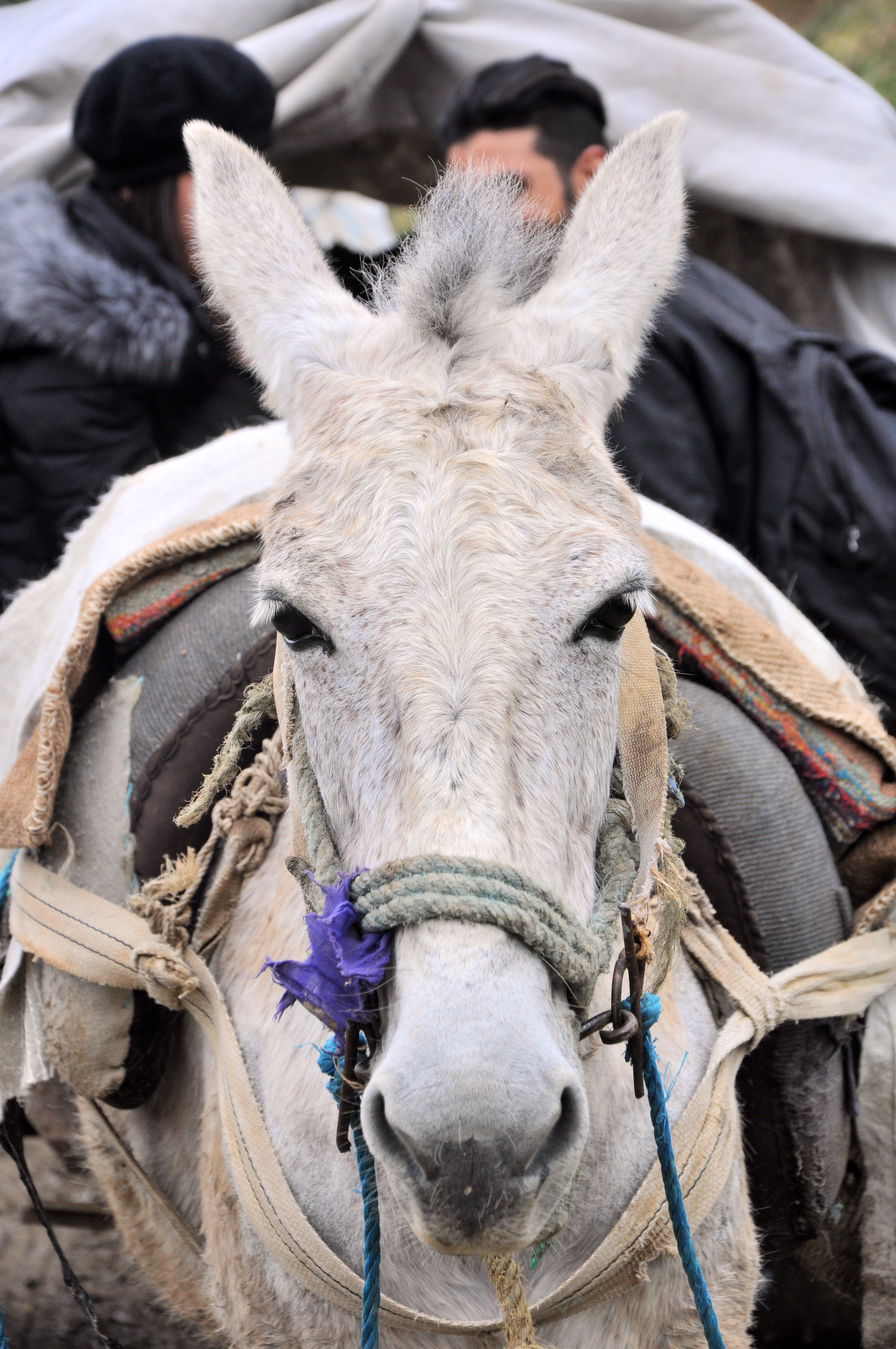 l'animal qui support